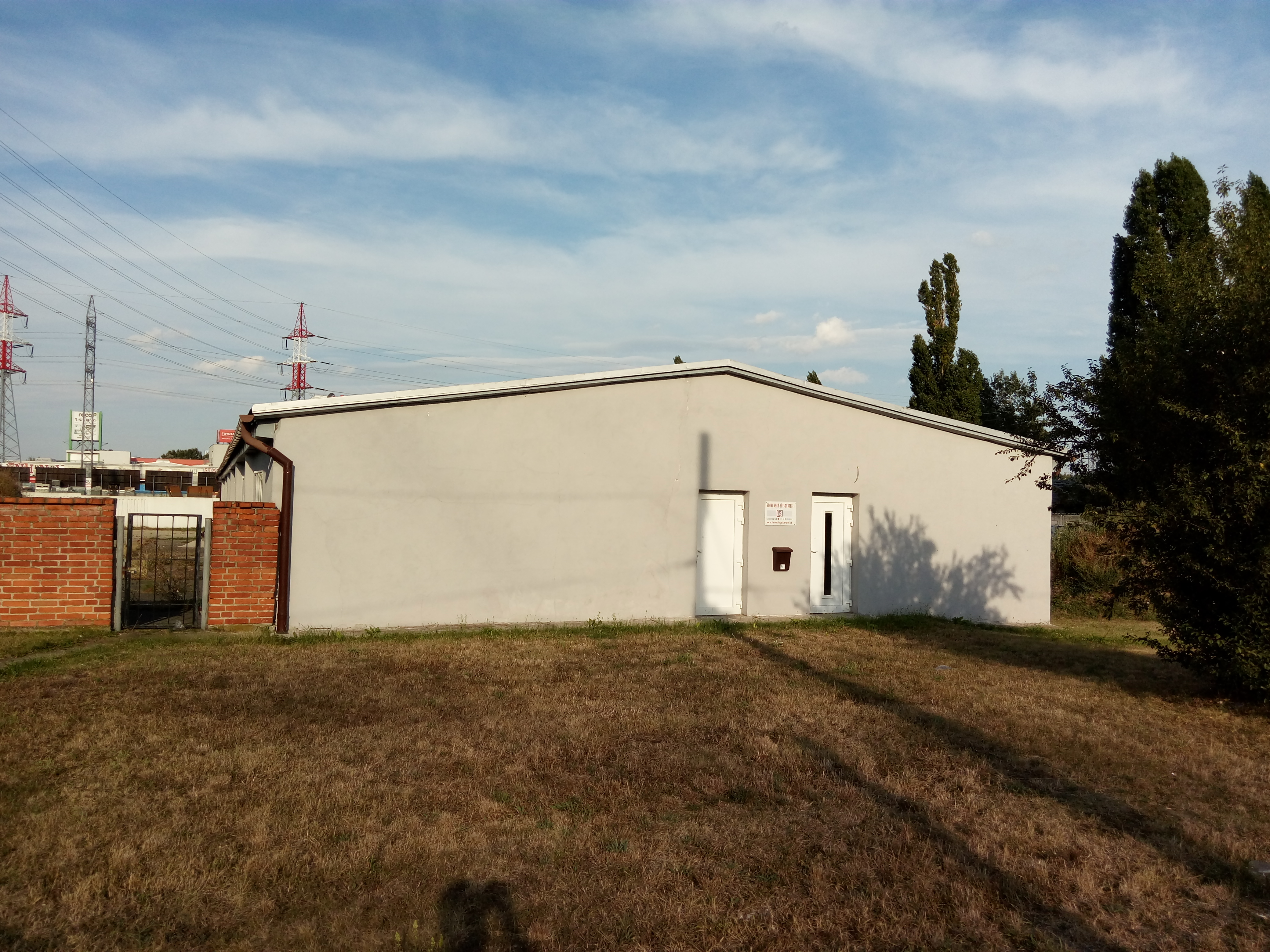 Vajnorská 128, Nové Mesto, Bratislava